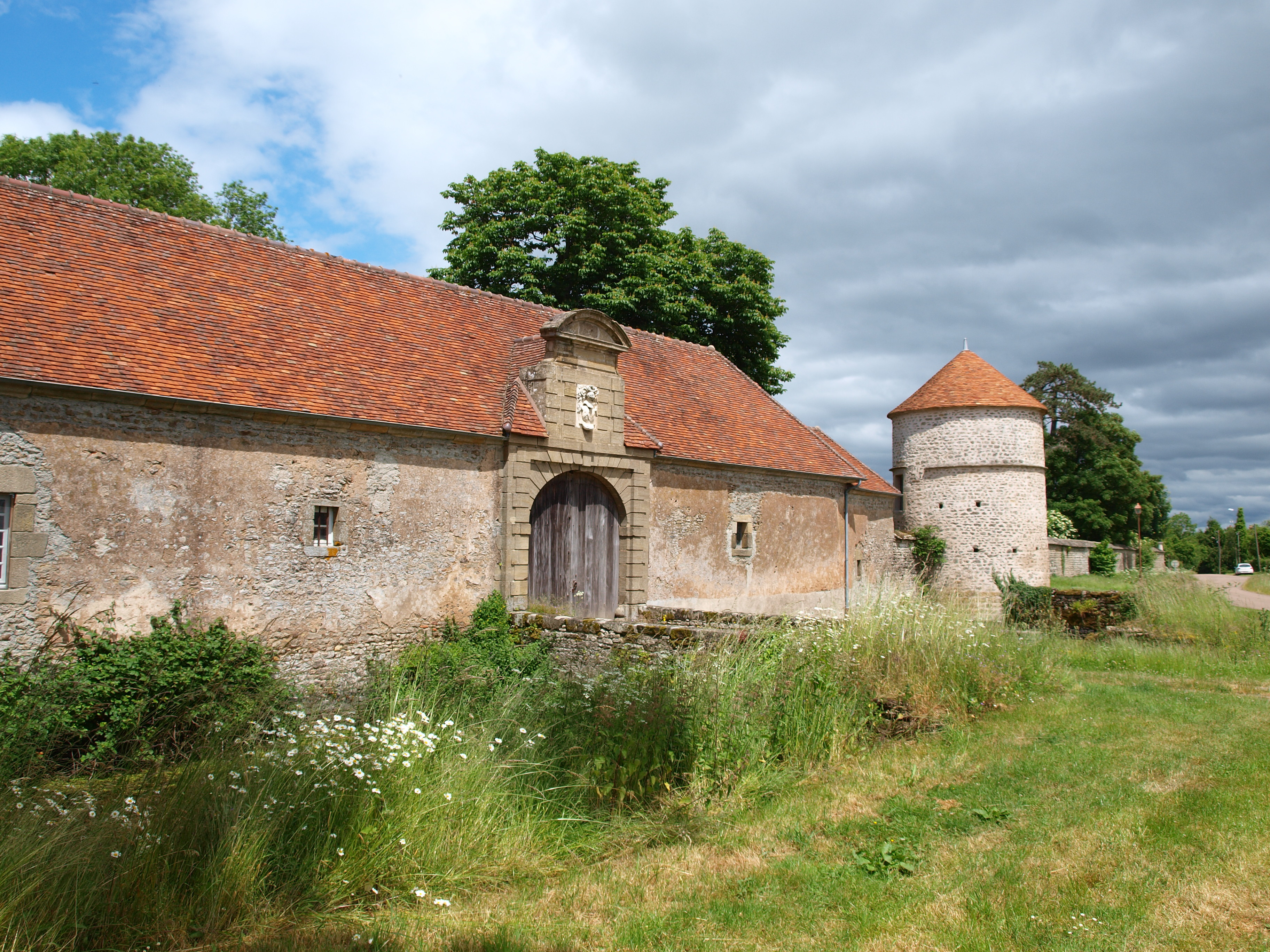 Hameau de Promenois, sur la commune de Jouey, en Côte-d'Or.